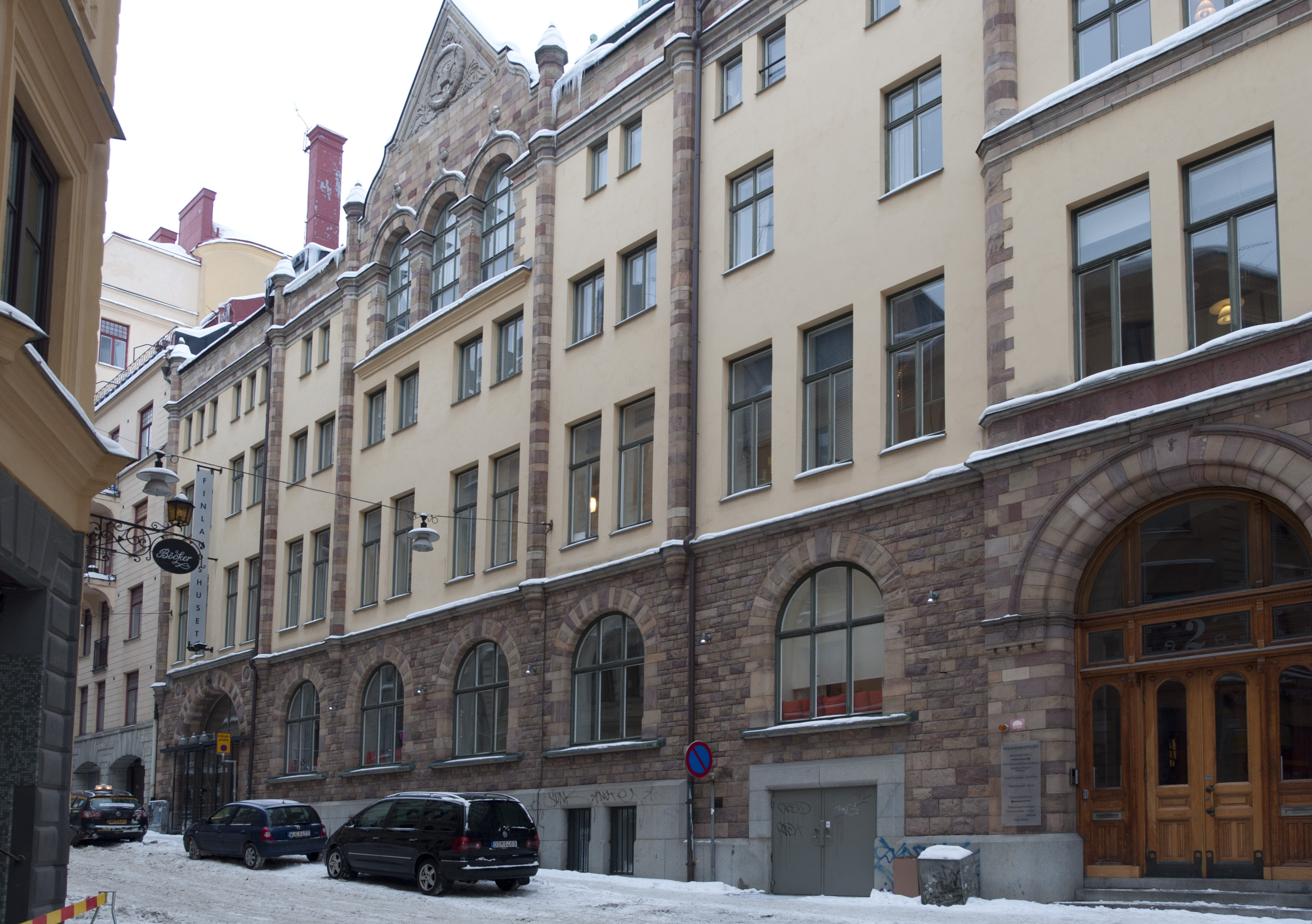 Snickarbacken 4. Byggnadsår 1896-98, arkitekt Johan Laurentz, byggherre KFUM